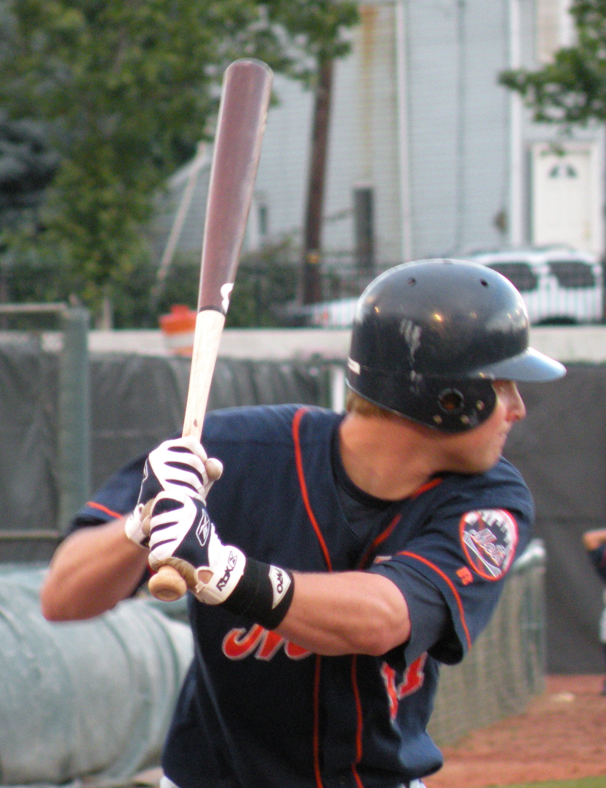 Shawn Bowman